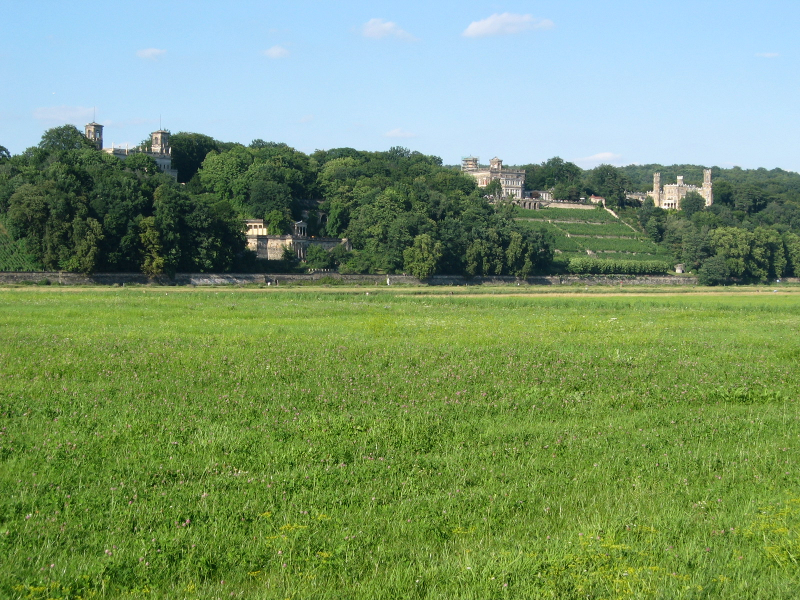 Elbwiesen mit Blick auf die drei Elbschlösser